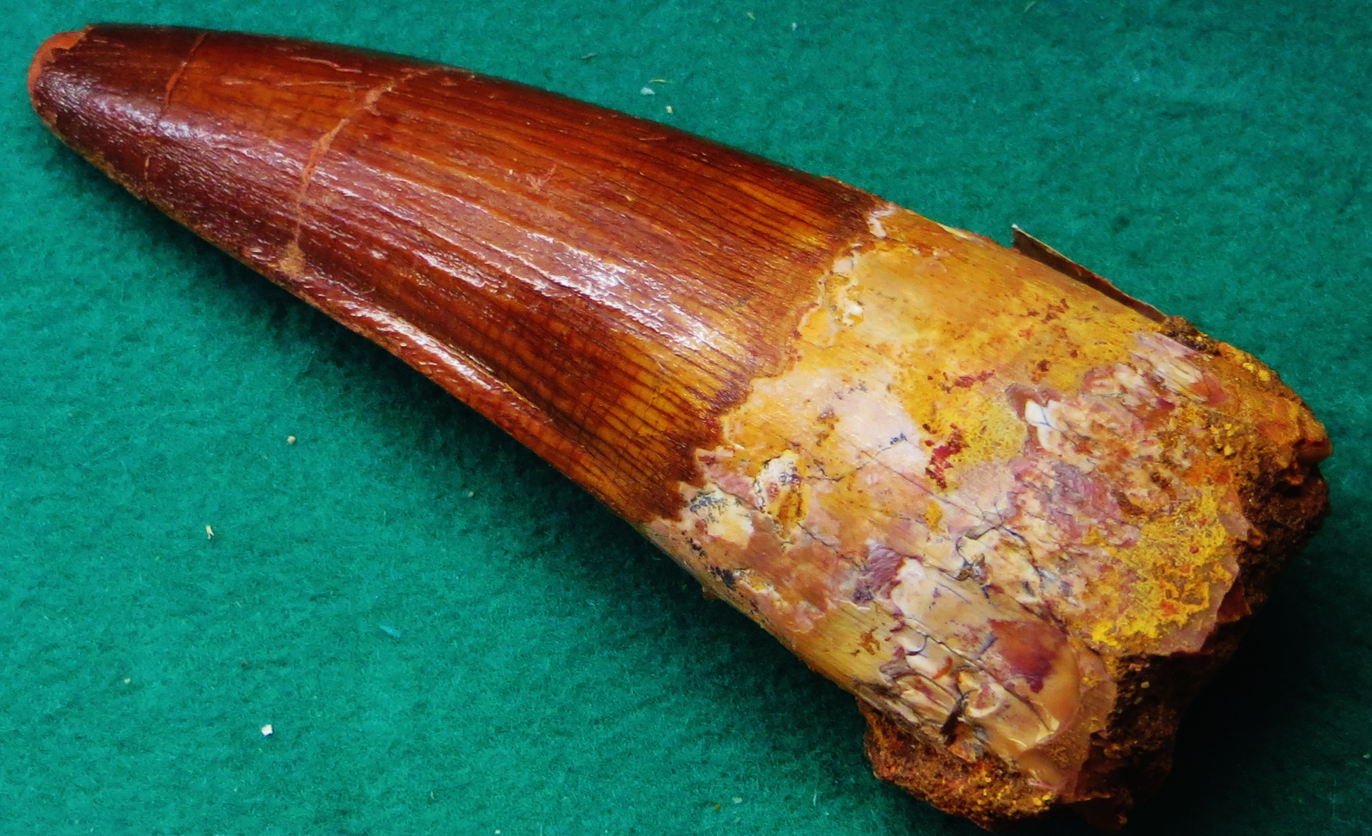 Fossil of Spinosaurus, an extinct reptile- Took the picture at Museo di Storia naturale “Antonio Stoppani” - Venegono Inferiore